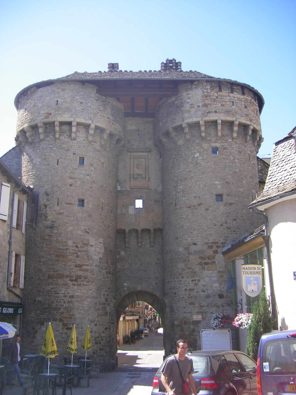 Marvejols